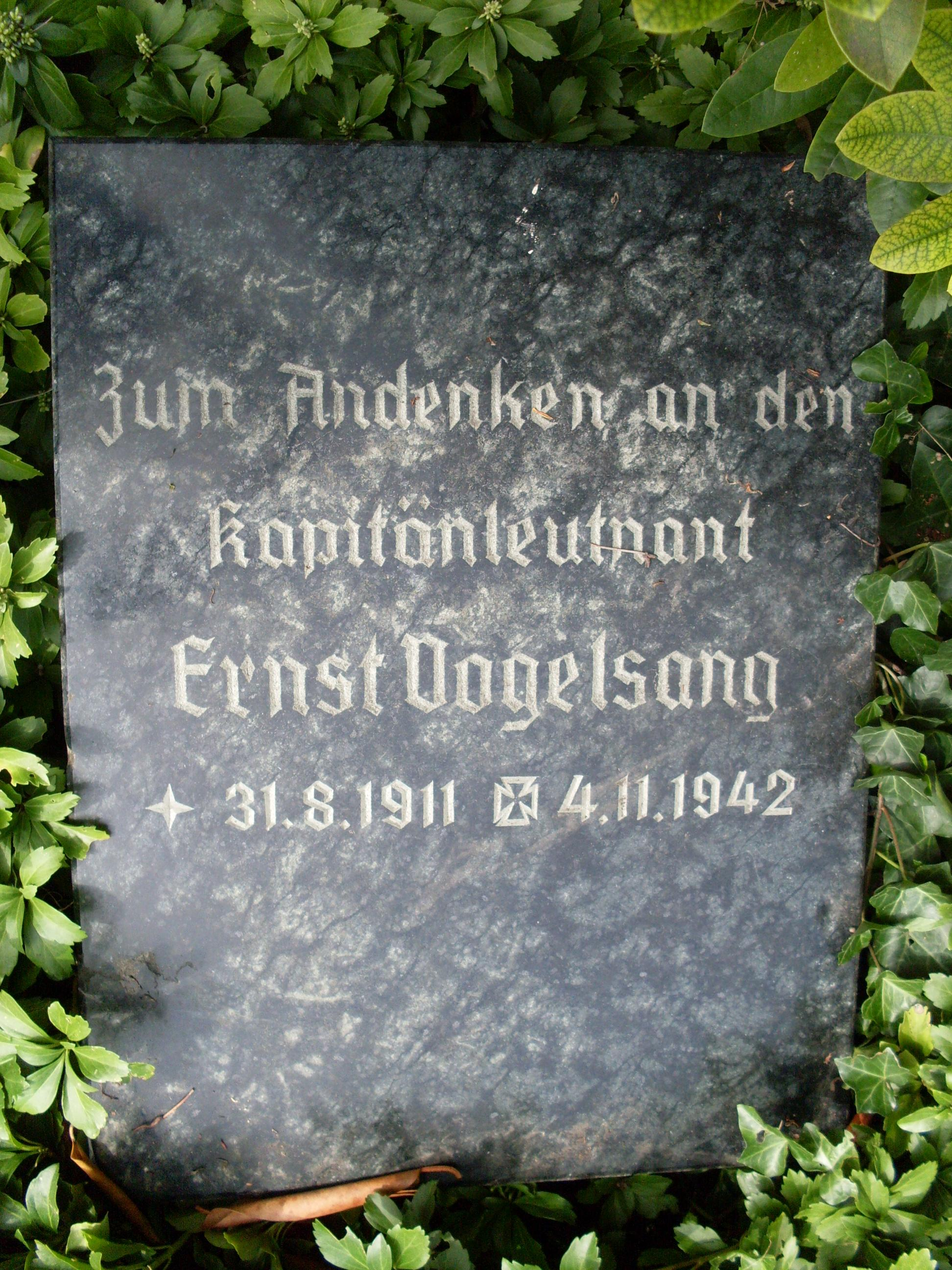 Zeigt die Grabstätte des Kapitänleutnants Ernst Franz Maria Vogelsang